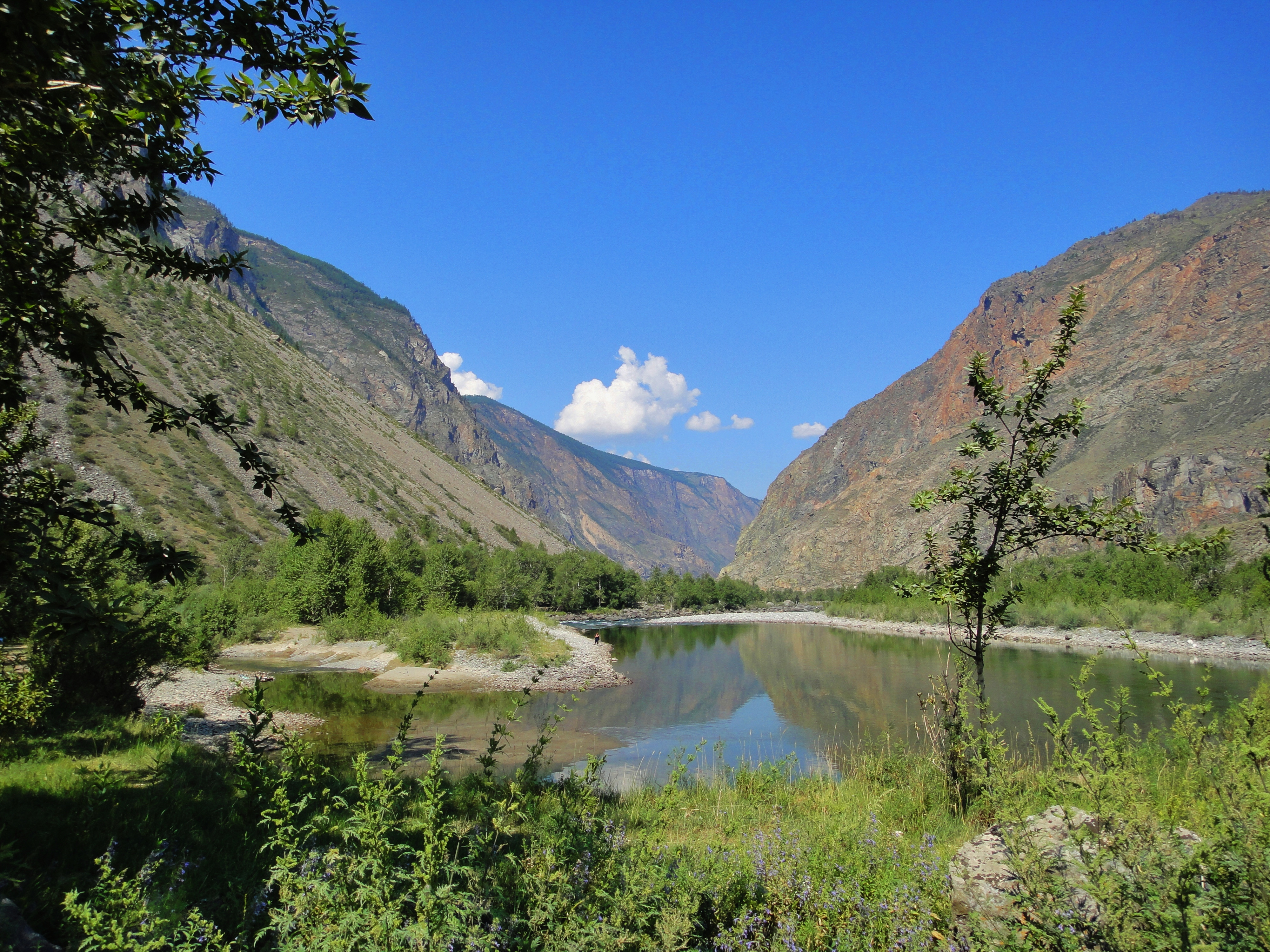 Чулышманский ландшафтный участок, Улаганский район This image is related to the protected area of Russia number 0410035